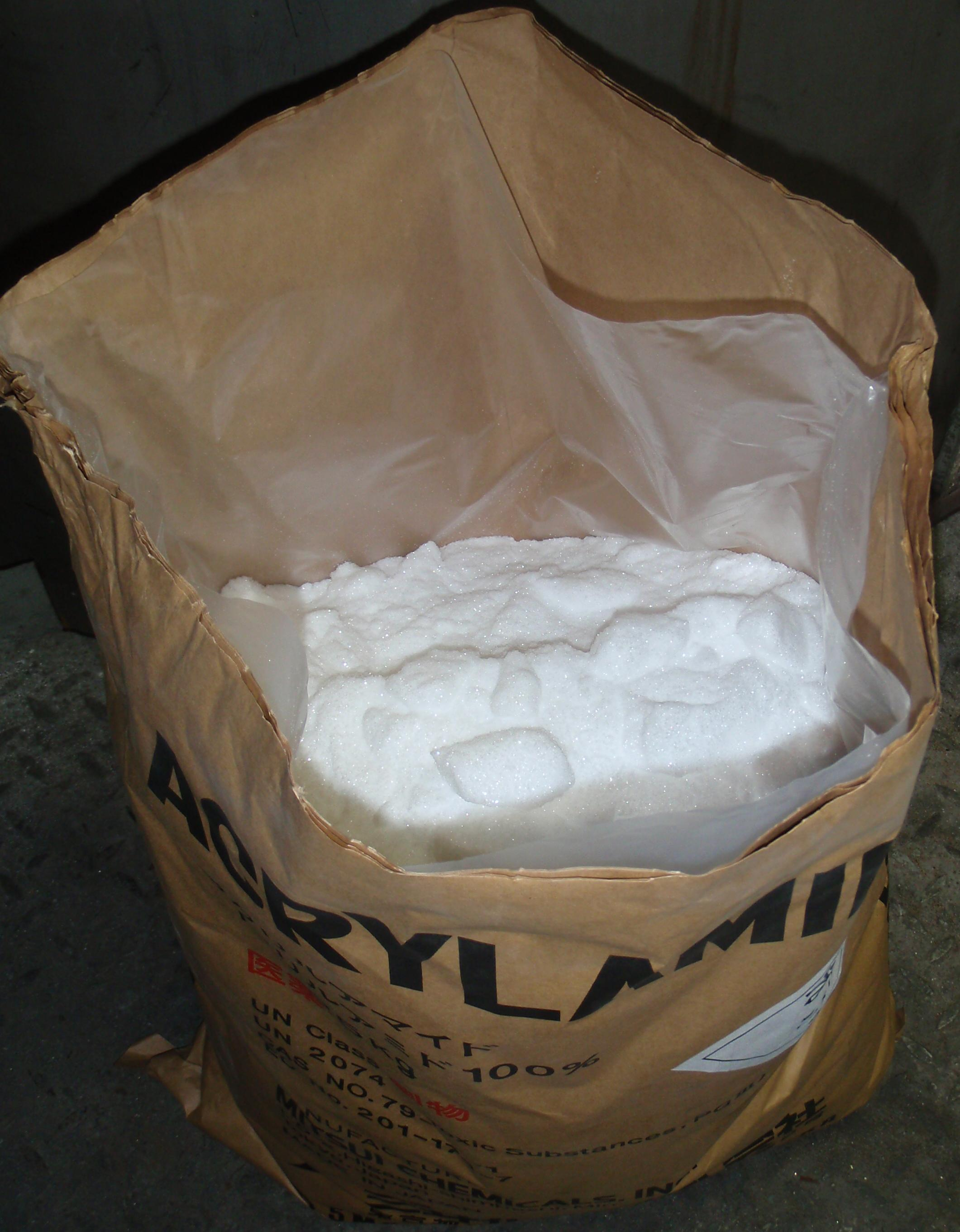 Acrylamid, eigene Aufnahme